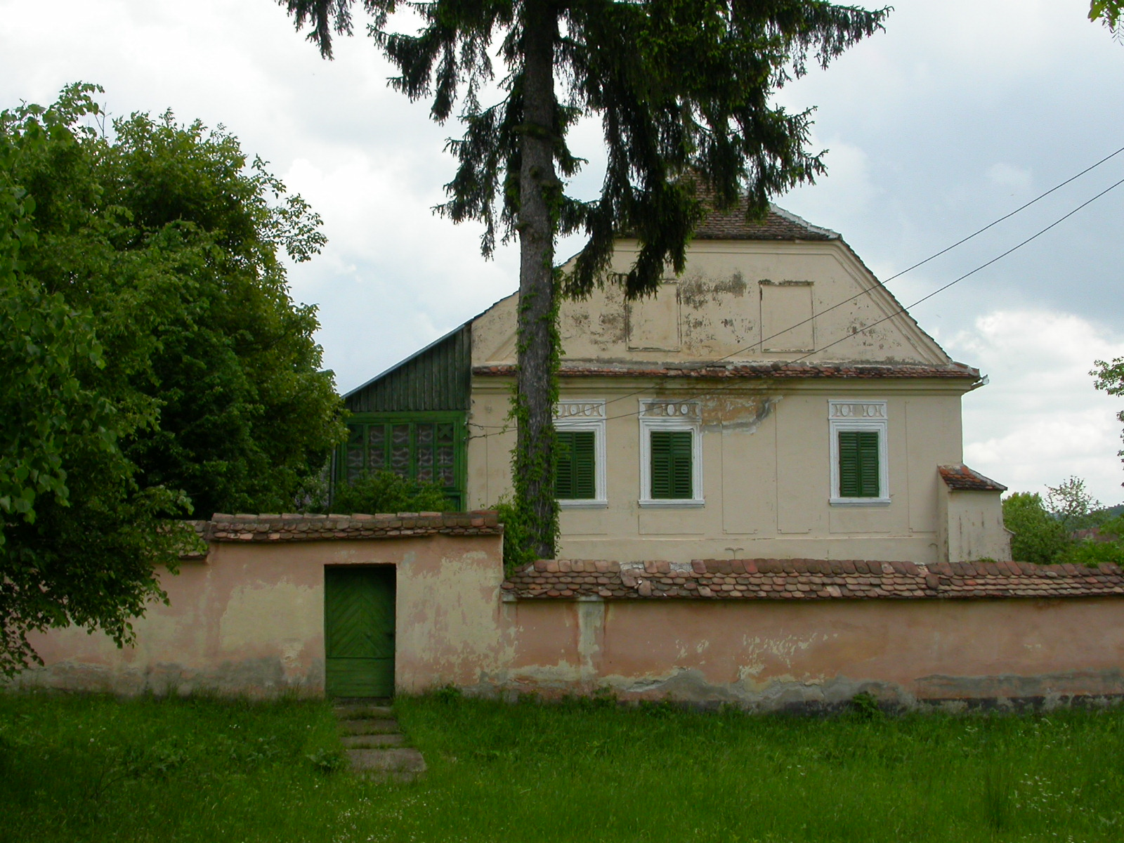 Casa parohială evanghelică, 1828,1920 - 1930